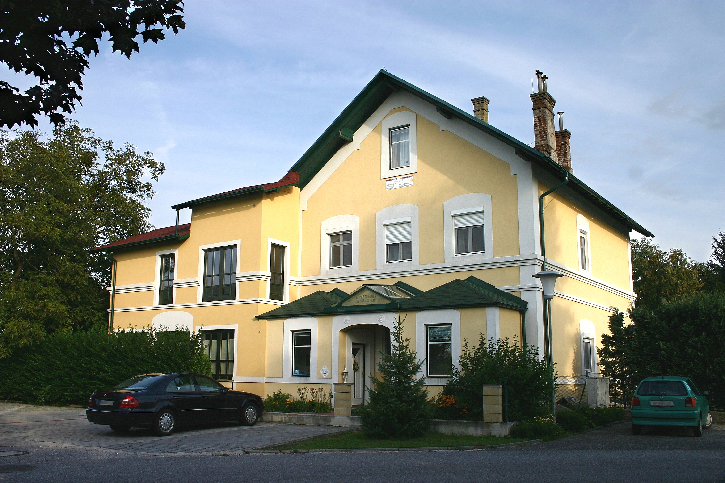 Lutzmannsburg ehemaliges Bahnhofgebäude